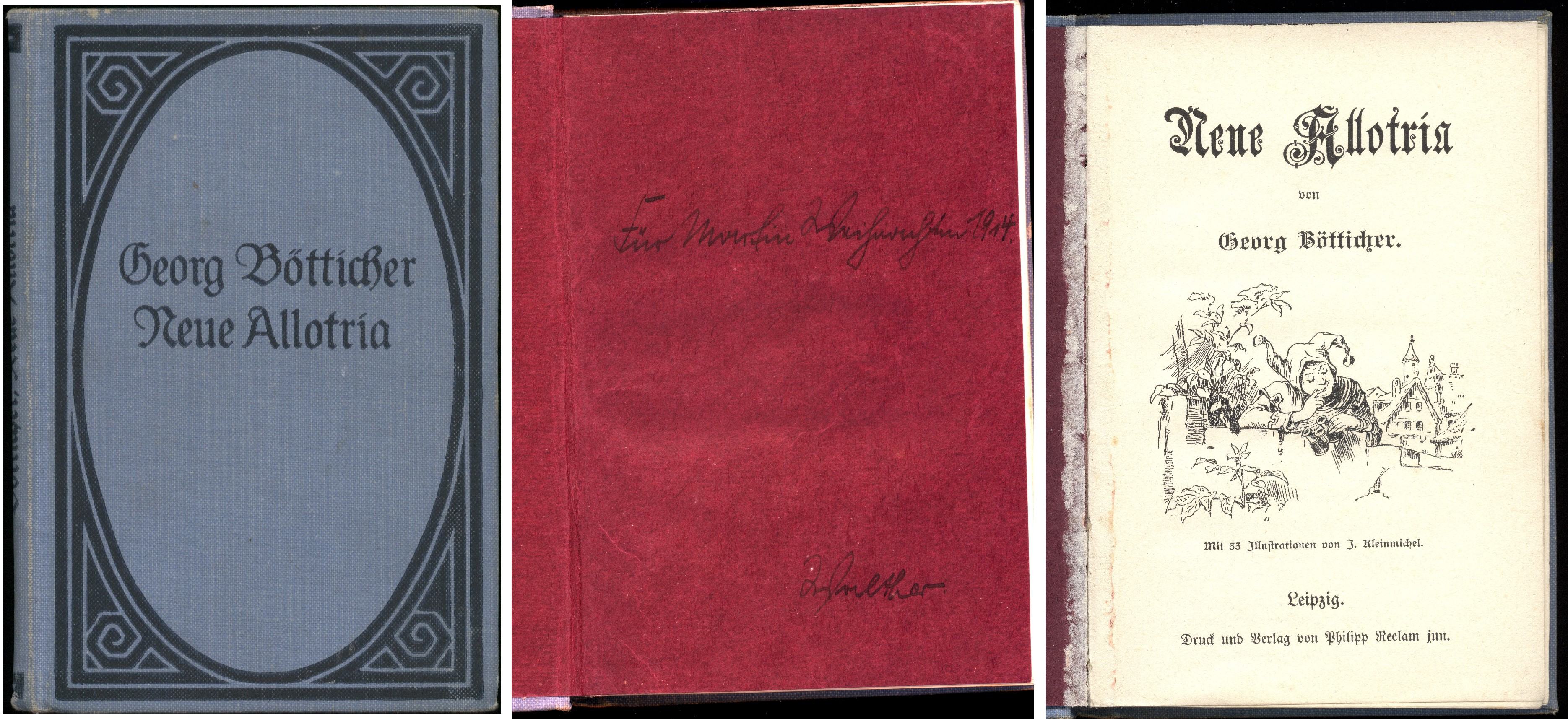 Einband und Titelblatt des Buches "Neue Allotria" von Georg Bötticher